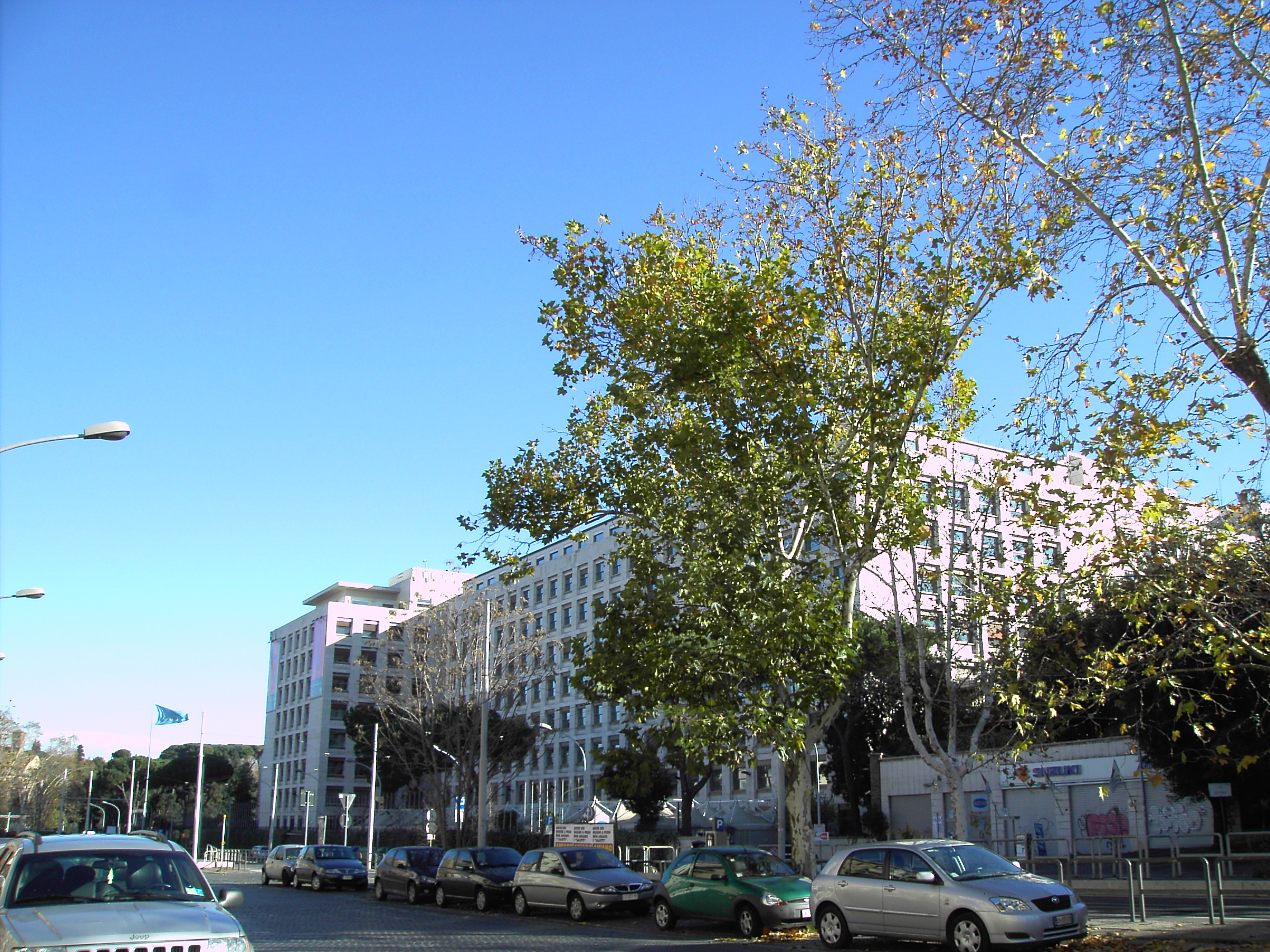 Roma, viale Aventino: il palazzo della FAO (ex Ministero dell'Africa Italiana). Architetto: Vittorio Cafiero. Progetto del 1938